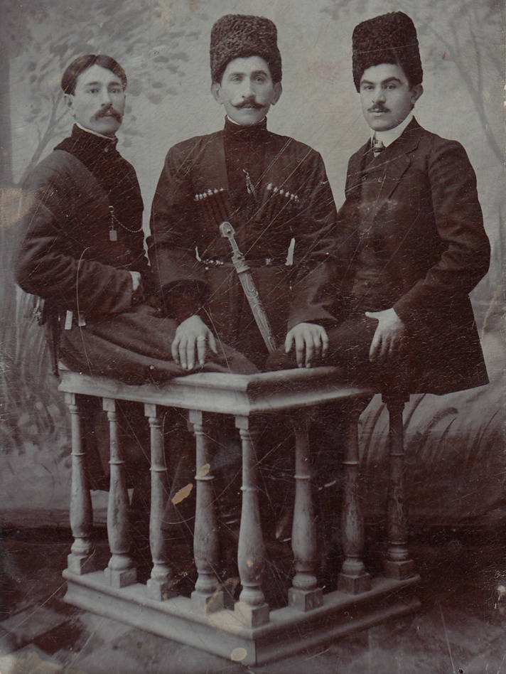 Гендаргеной: Чуликовы и Махма Мациев в центре